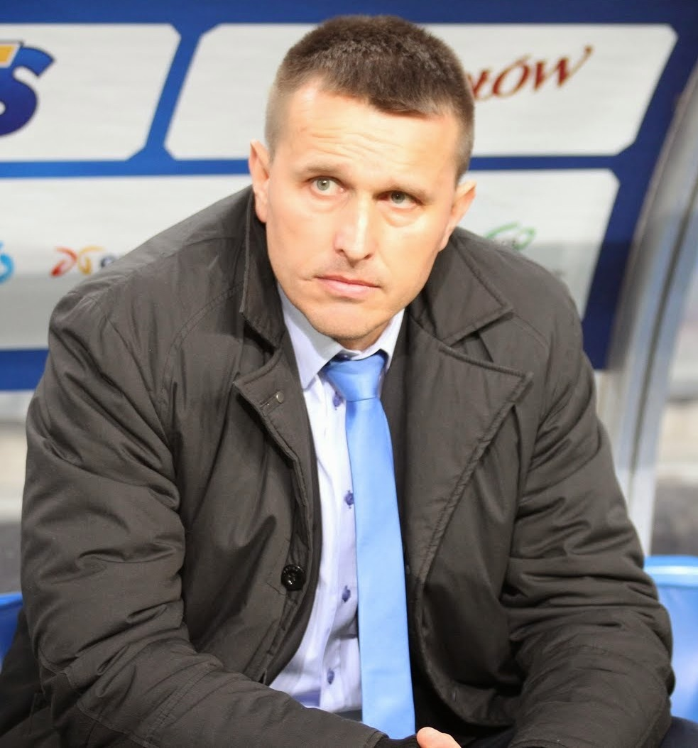 Leszek Ojrzyński jako trener Podbeskidzia Bielsko Biała.